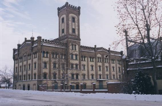 Jánoshalma, malom. (saját kép)